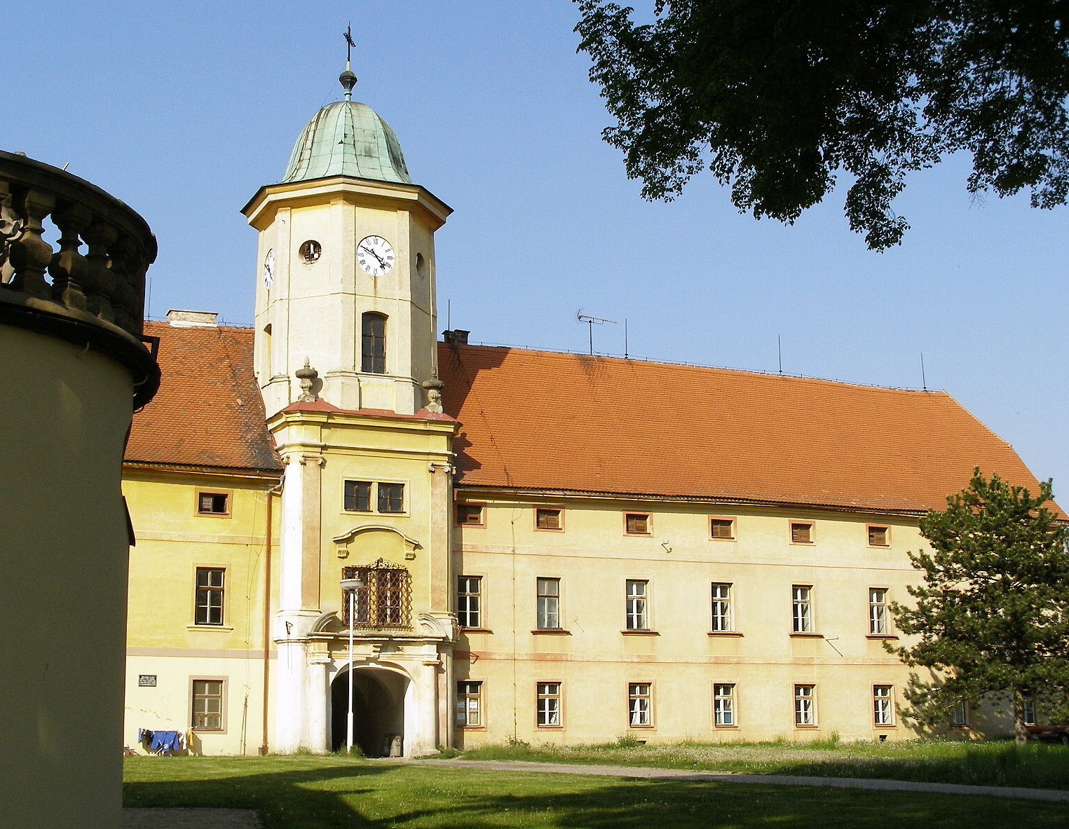 Mořice - zámek s barokní věží